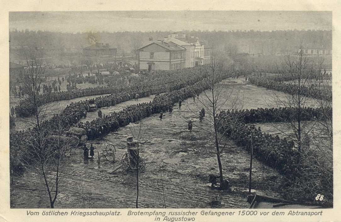 Bildseite: «Vom östlichen Kriegsschauplatz. Brotempfang russischer Gefangener 15000 vor dem Abtransport in Augustowo.», Rückseite:«Verlag Gebrüder Hochland, Königsberg i. Pr. Originalaufnahme von Hofphotograph A. Kühlewindt, offizieller Kriegsphotograph, Königsberg i. Pr.».